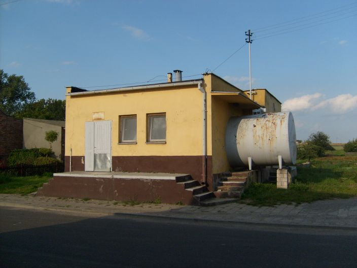 Mleczarnia w Ożarowie.